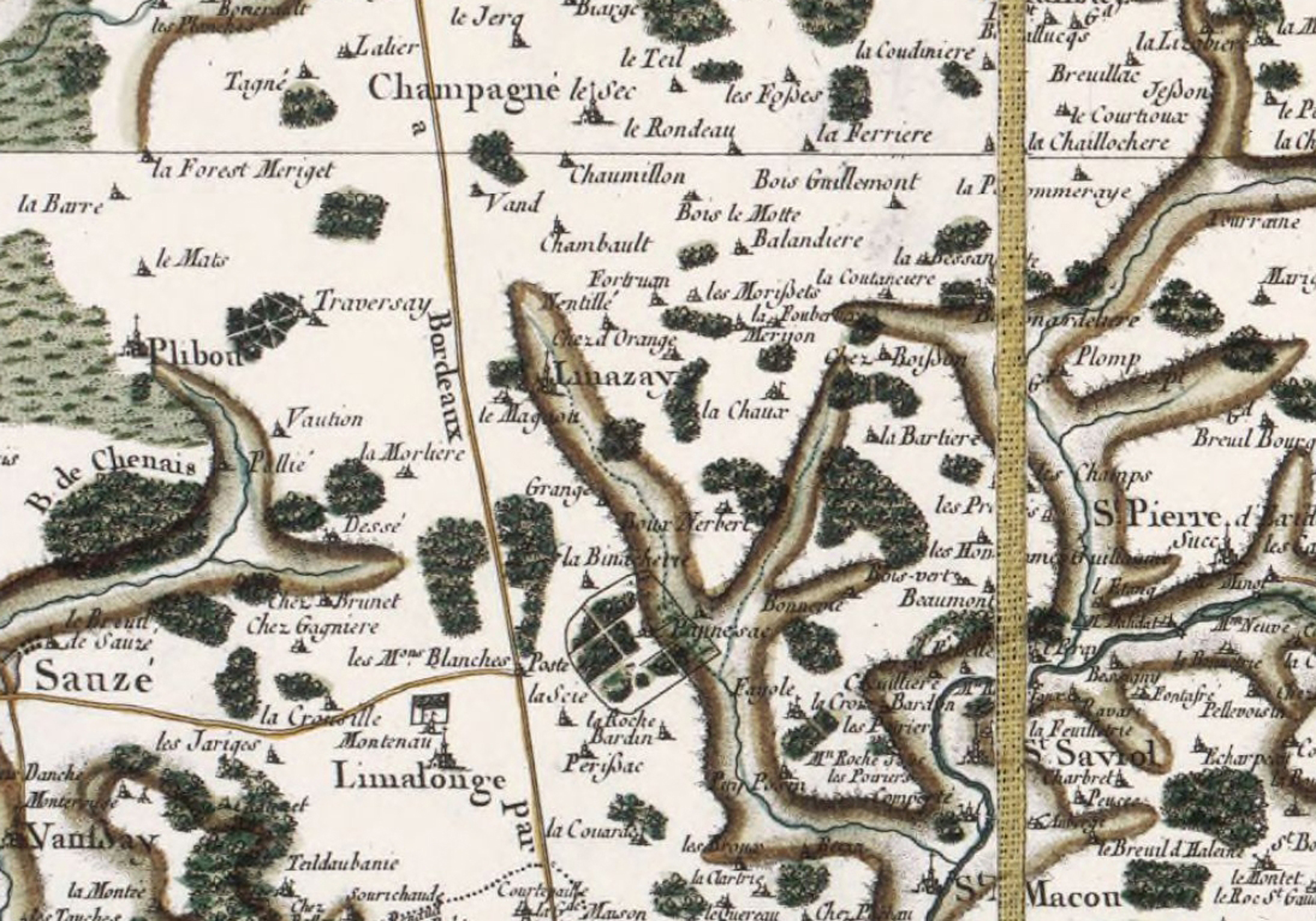 Carte de Cassini, détail de la région de Linazay, 1770-1773